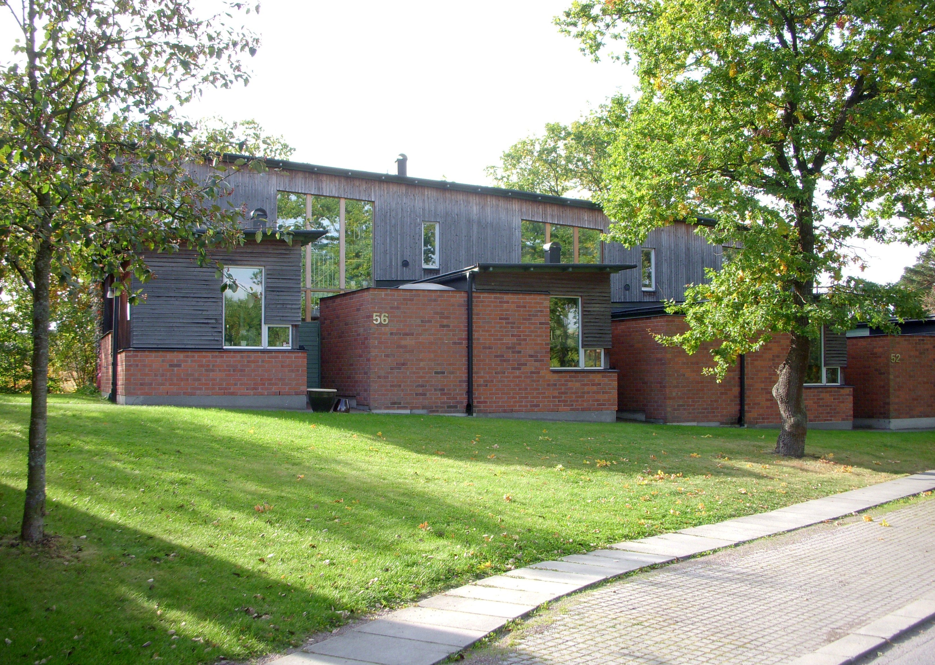 Nybodahöjden i Stockholm